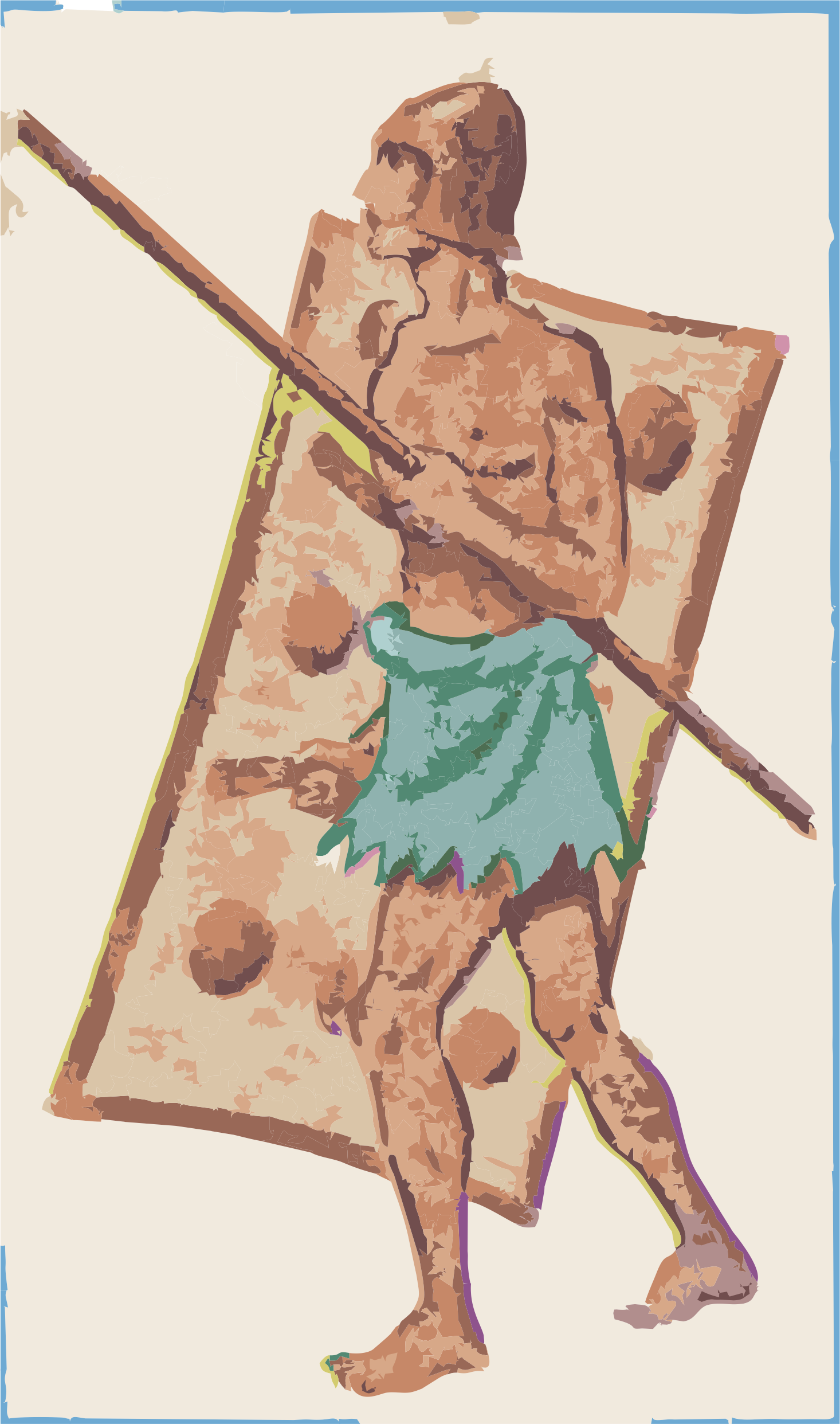 Lancero sumerio. 3.000 años A. de C. La primera representación gráfica de· fa Infantería que se conoce y se trata de la "Estela de los Buitres" del rey del país de Sumer, en la que aparecen formaciones de infantes armados de lanza y protegidos por escudos y cascos de cuero.